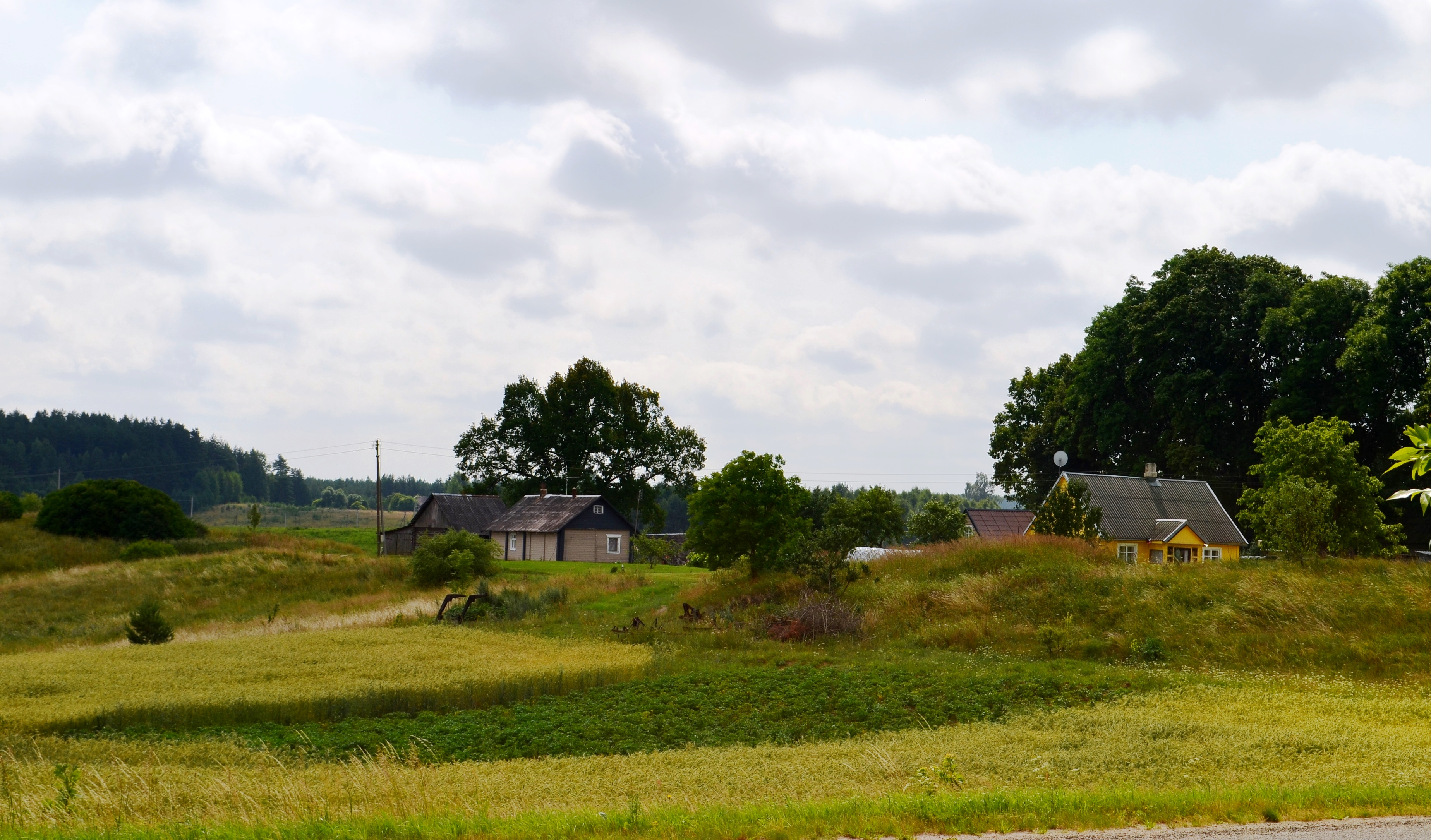 Pakryžė, Luokesos sen., Molėtų r.